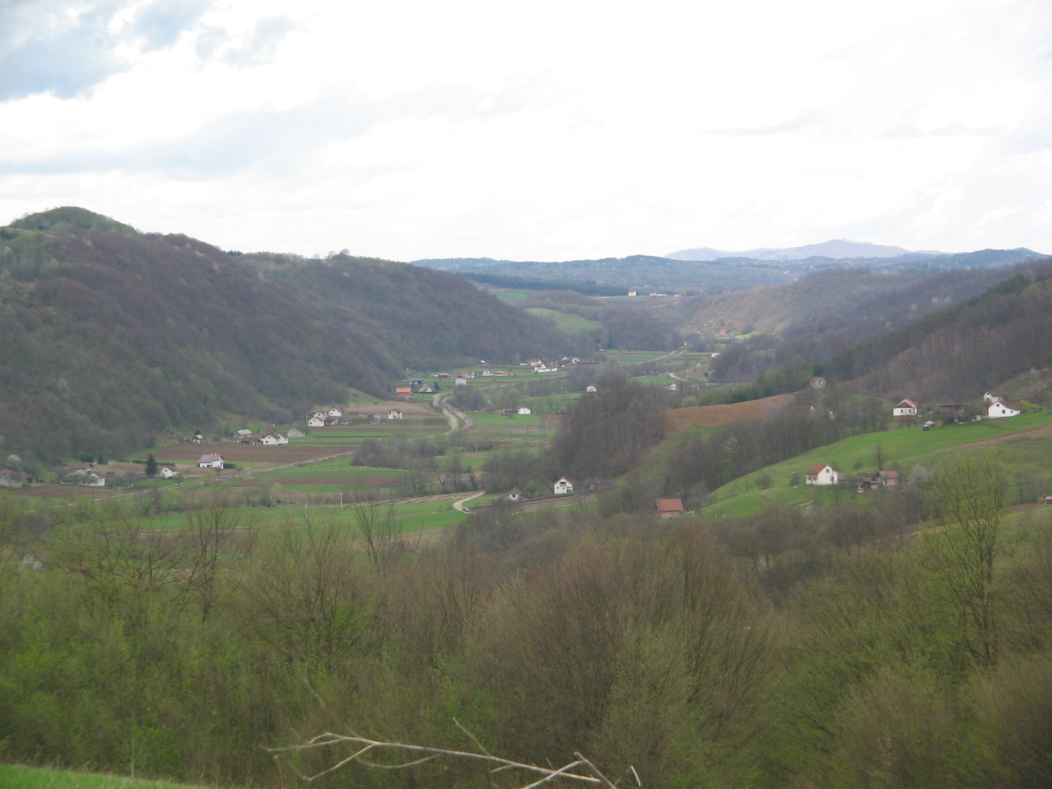 Долина ријеке Укрине у Горњим Вијачанима. Сликано из Ђурђевића